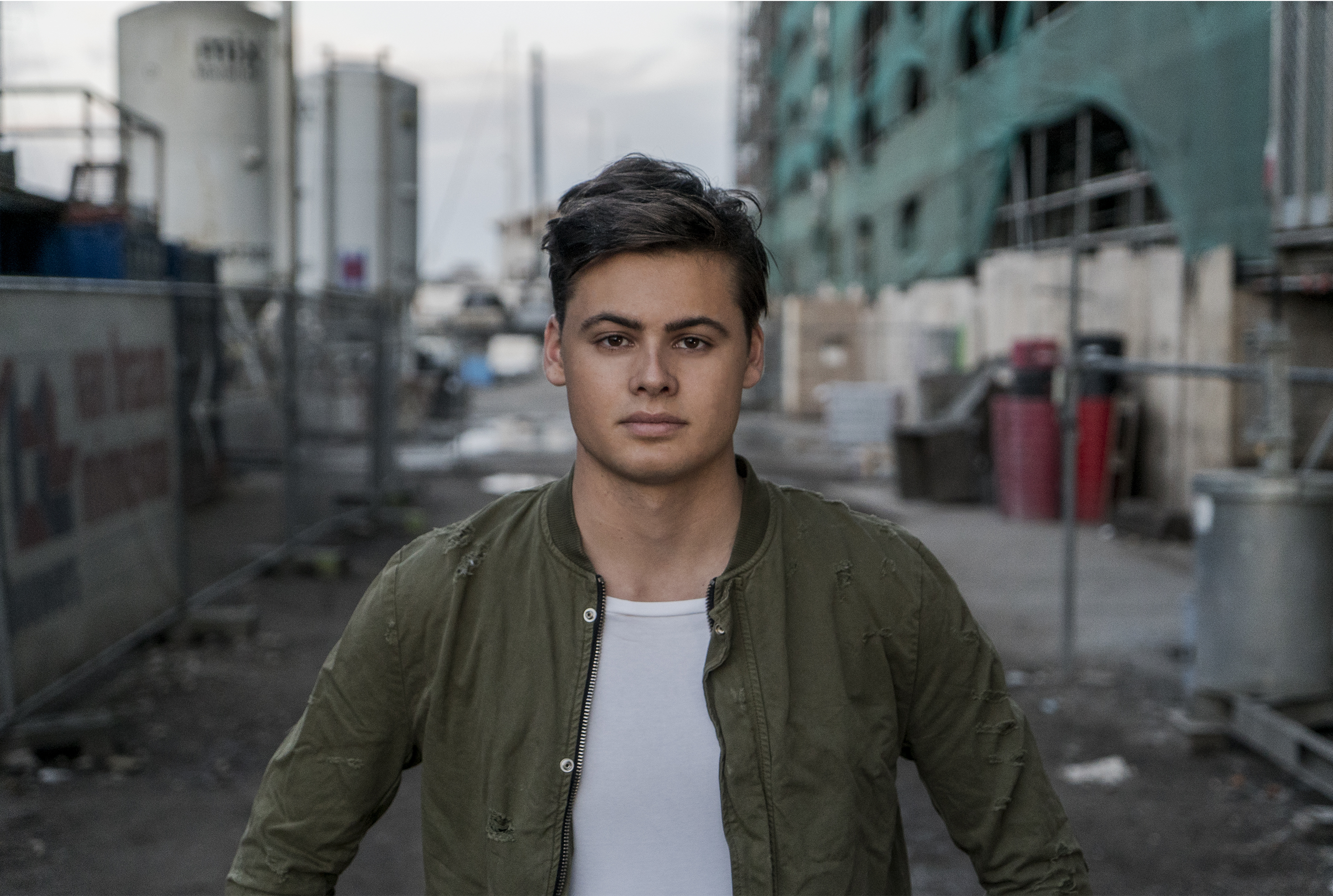 Mike Williams, born 27 november 1996. Photoshoot in Amsterdam, june 2016